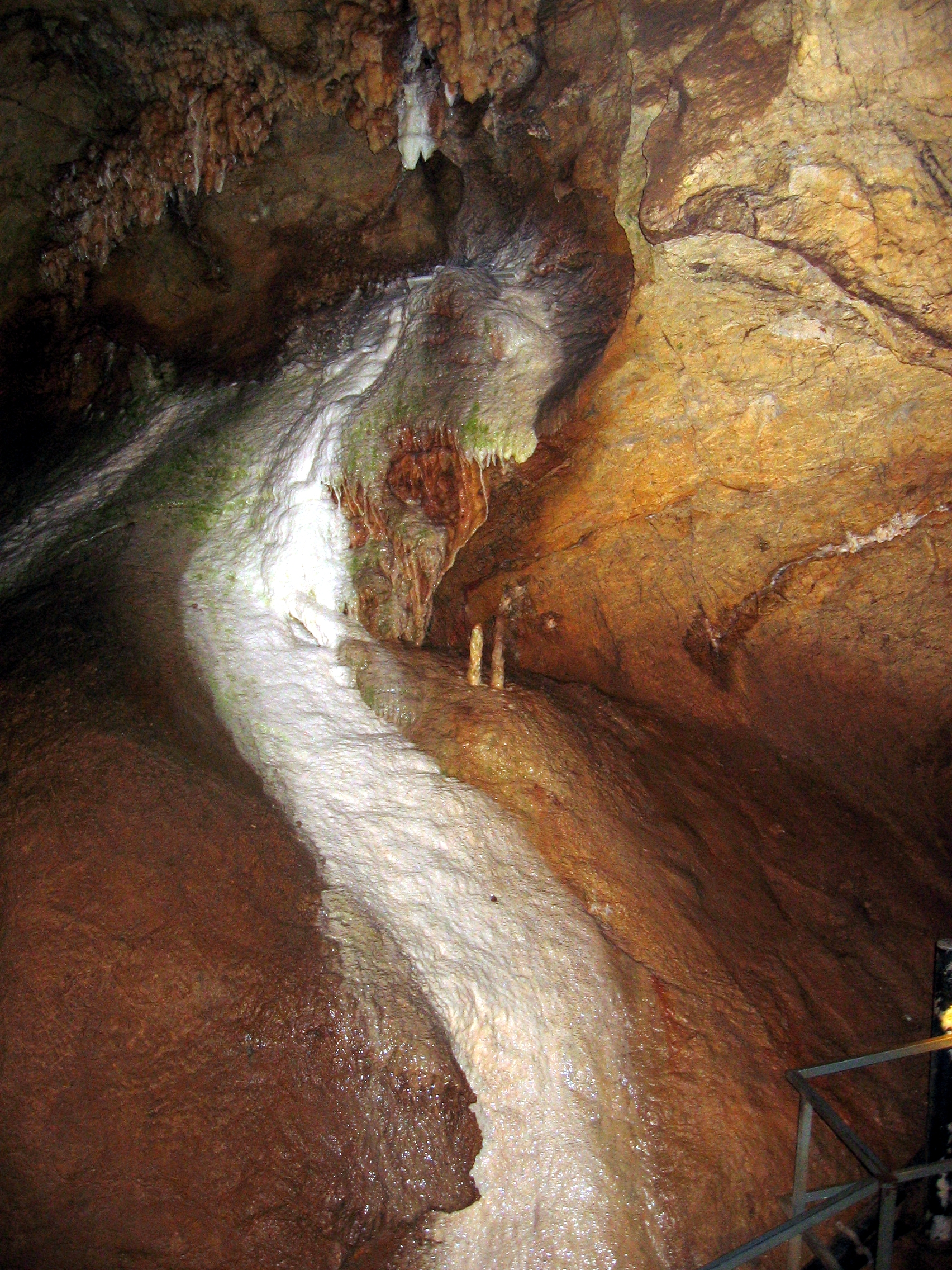 Sinterablagerungen in der Kubacher Kristallhöhle